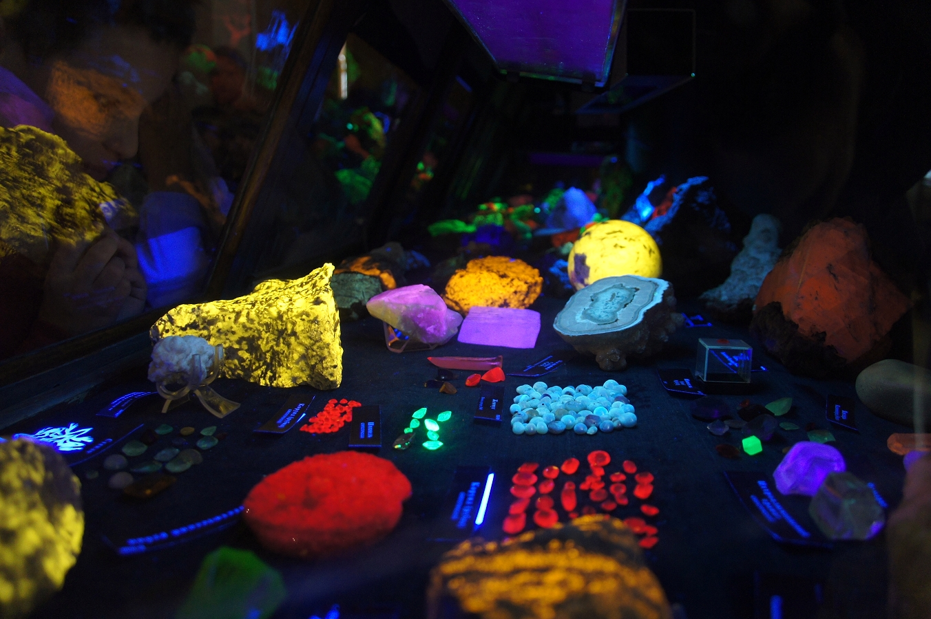 Фотолюминесценция различных минералов под действием ультрафиолетового света. Минералогический музей имени А. Е. Ферсмана